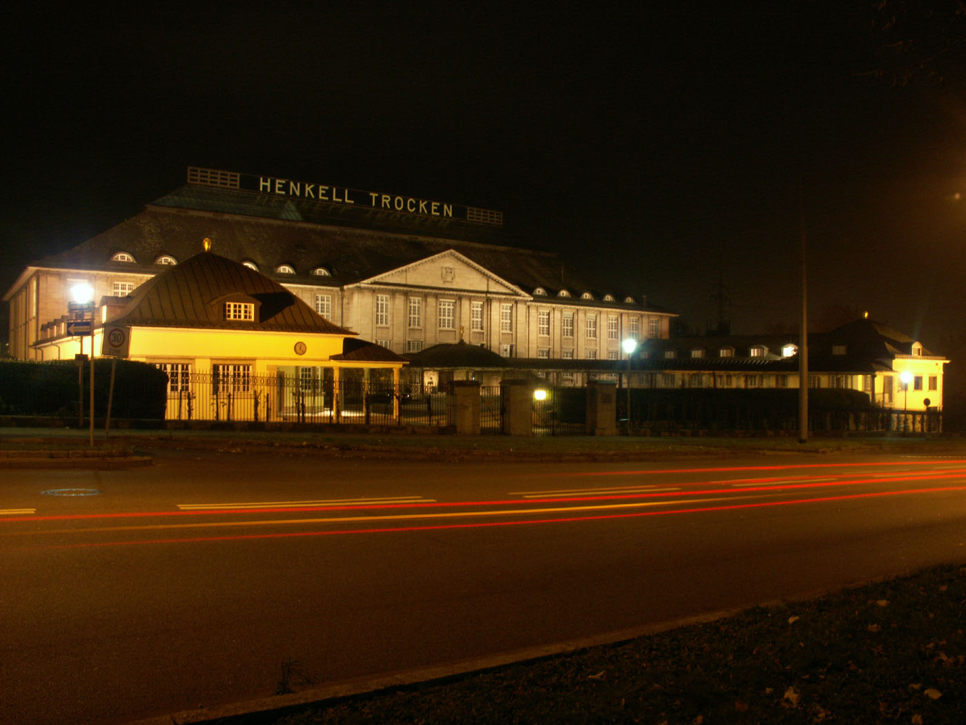 Henkell pezsgőgyár Wiesbaden